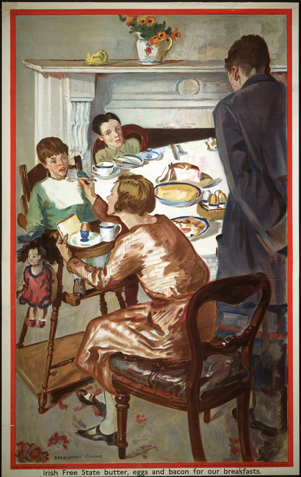 Title / Titre : Irish Free State Butter, Eggs and Bacon for our Breakfasts (Poster promoting Irish Free State farm goods for breakfast to Canadians.) / Du beurre, des œufs et du bacon de l’État libre d’Irlande au déjeuner Creator(s) / Créateur(s) : Margaret Clarke Date(s) : 1926-1934 Reference No. / Numéro de référence : C-126912 Location / Lieu : Unknown / Inconnu Credit / Mention de source : Canada. Patent and Copyright Office / Bureau des brevets et du droit d'auteur; Library and Archives Canada / Bibliothèque et Archives Canada; C-126912.